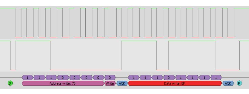 Analyse d'une trame I2C avec un analyseur de bus.